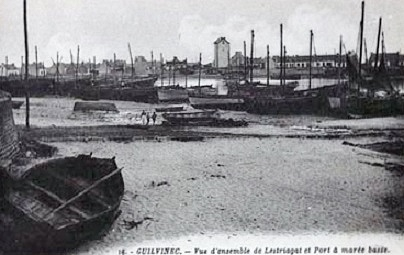 Le port de Lestriagat (Léchiagat) au début du XXe siècle.